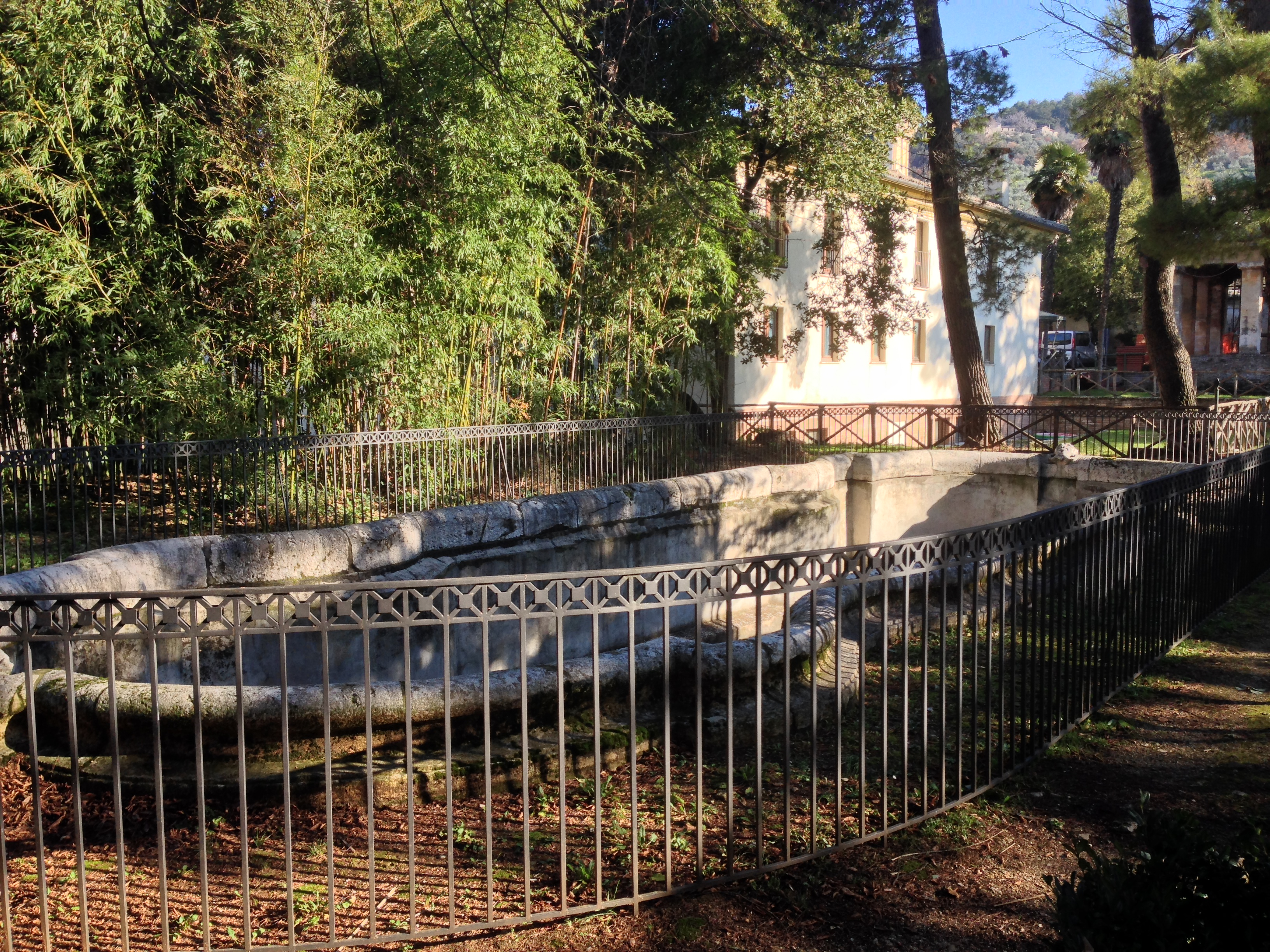 Villa Redenta, peschiera. Spoleto